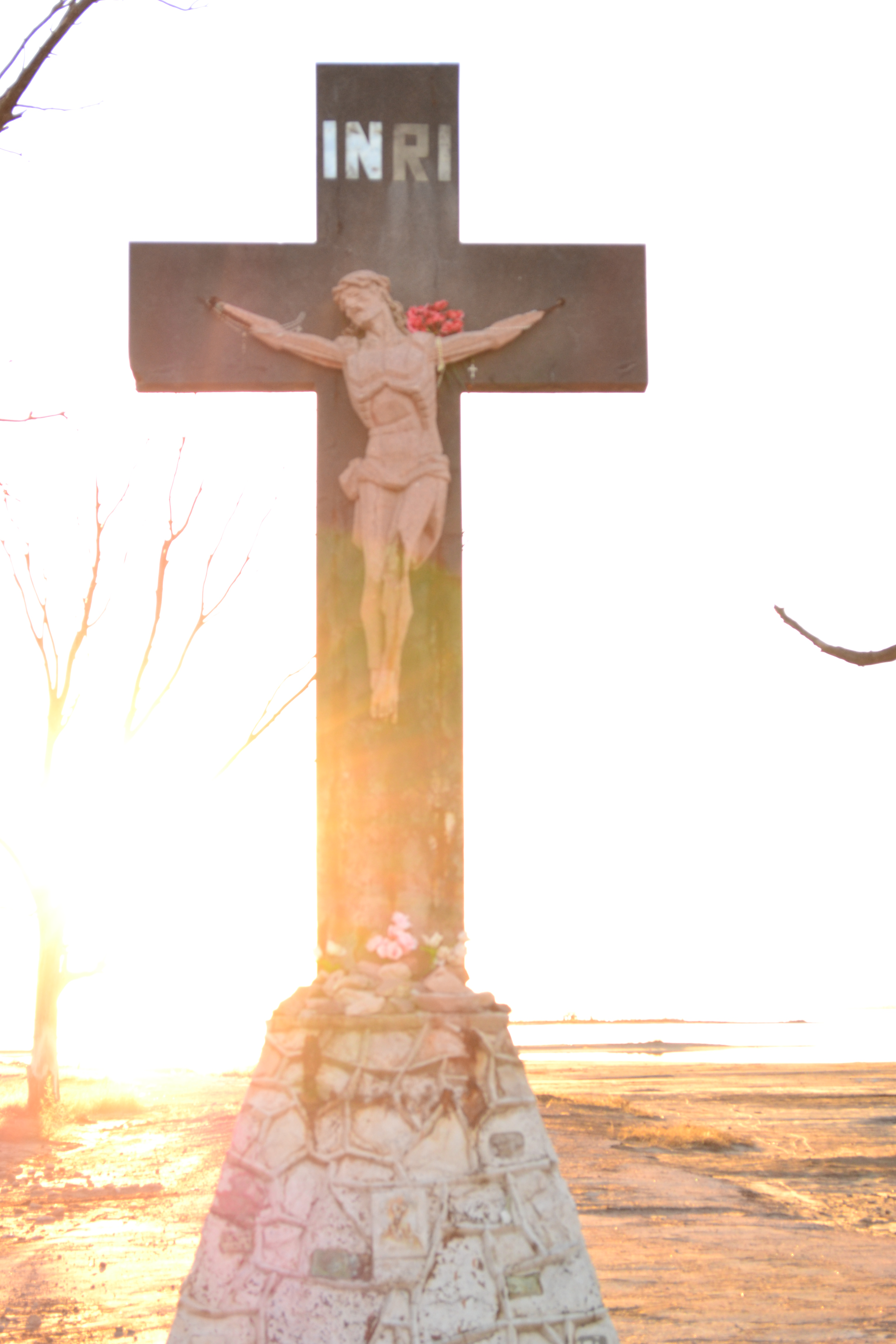 cristo y el sol